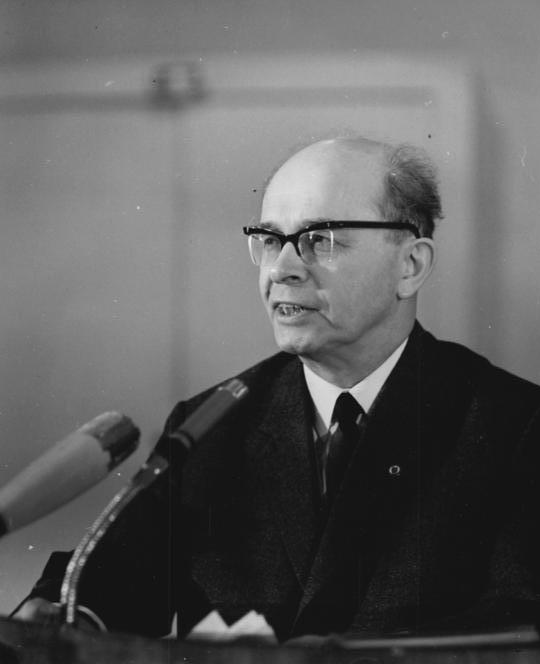 Zentralbild Franke 14.11.1966 Die 1. Jahreskonferenz des Deutschen Schriftstellerverbandes fand in der Zeit vom 2.11. - 4.11.66 in der Kongreßhalle am Berliner Alexanderplatz statt. 350 Teilnehmer der Konferenz (Schriftsteller, junge Autoren, schreibende Arbeiter, Literaturwissenschaftler und Bibliothekare) berieten über die Entwicklung der sozialistischen deutschen Nationalliteratur. UBz: Alexander Abusch, Stellvertreter des Vorsitzenden des Ministerrates der DDR, während seines Diskussionsbeitrages.